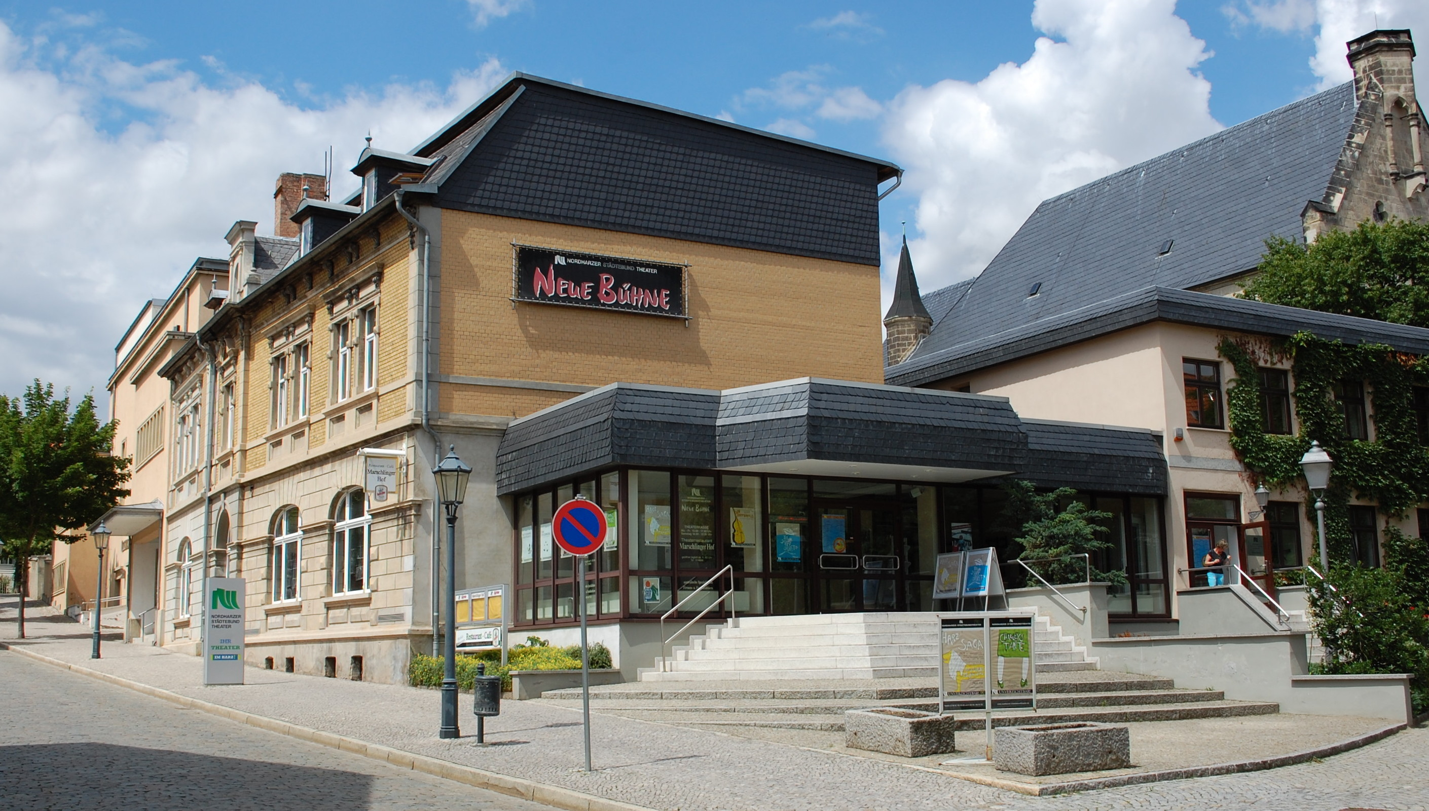 Haus Marschlinger Hof 17 in Quedlinburg